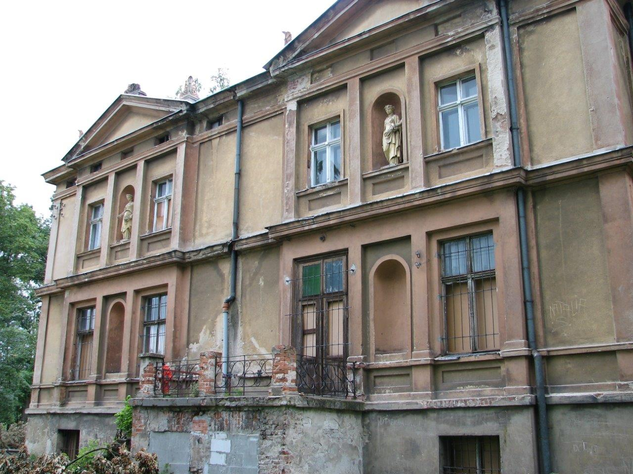 Dwór w Sarnowie elewacja południowa